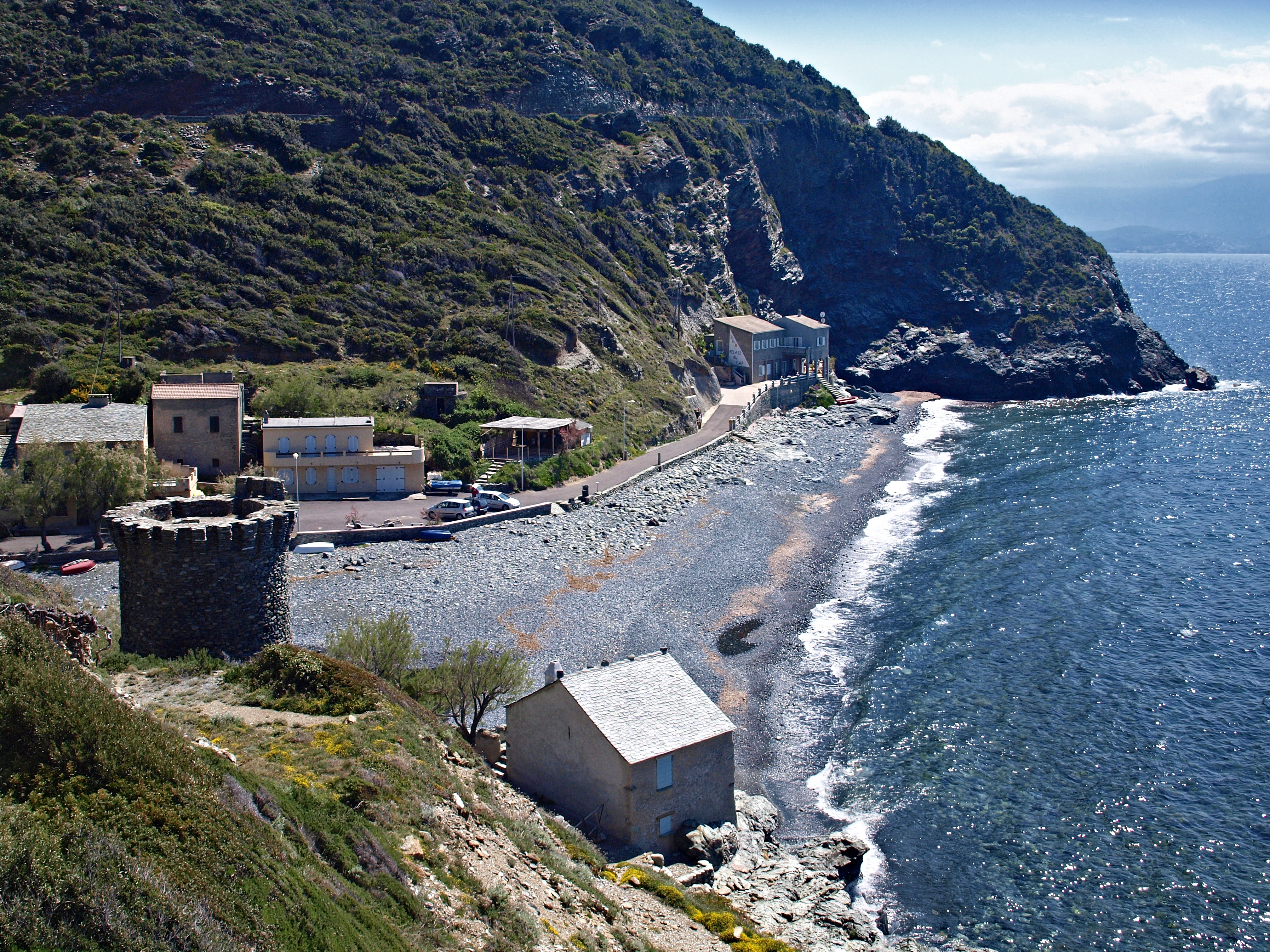 Olmeta-di-Capocorso (Corsica) - Marine de Negru, sa plage et la tour génoise.